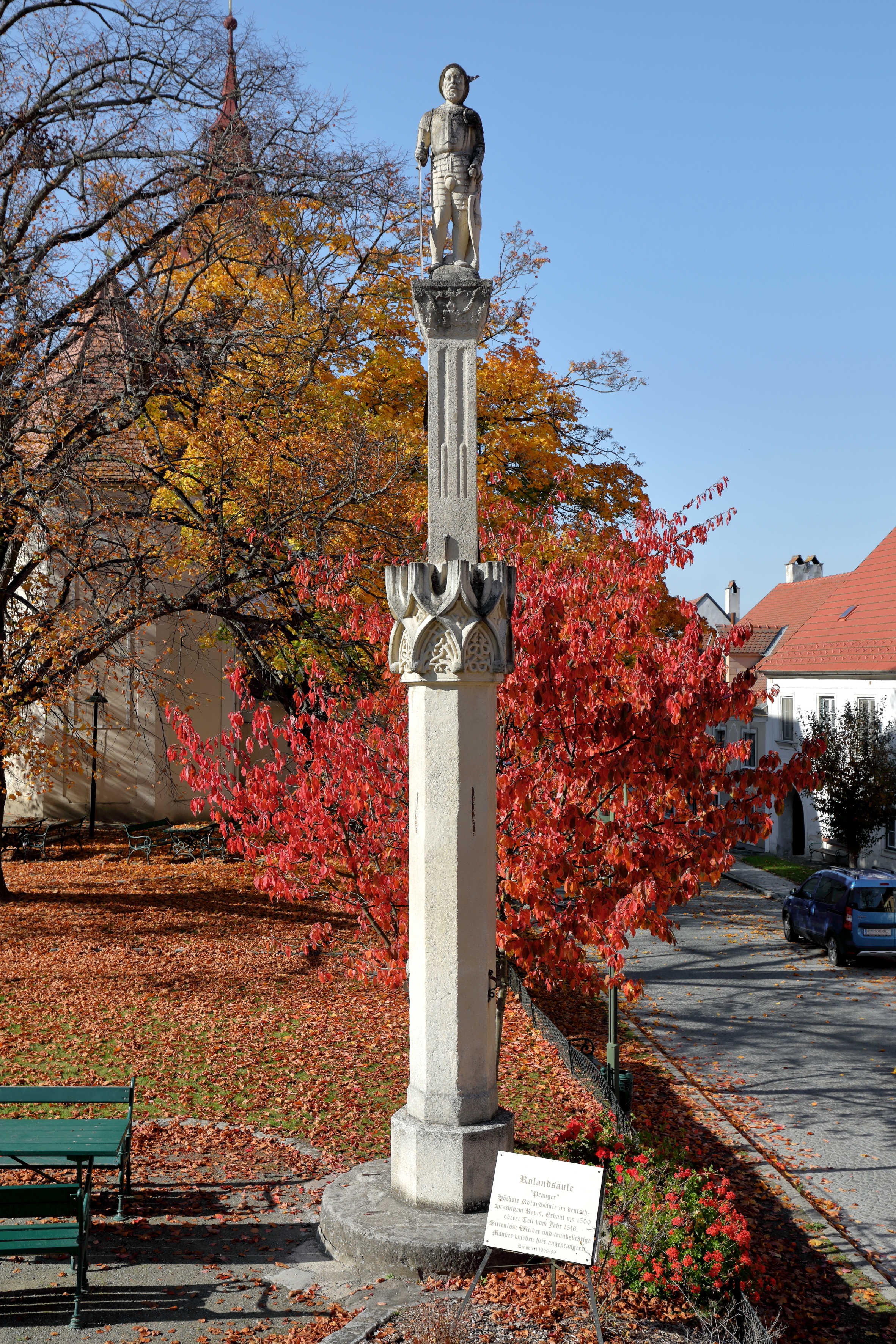 Die Rolandsäule bzw. der Pranger am Hauptplatz in Drosendorf, ein Ortsteil der niederösterreichischen Stadt Drosendorf-Zissersdorf.Eine zweistufige Säule, die mit einer Rolandstatue bekrönt ist. Die untere spätgotische, achteckige Säule mit Kielbogenkranz ist ein Pranger und wurde Anfang oder Mitte des 16. Jahrhunderts errichtet. Die Rolandfigur stammt aus dem Jahr 1616. 1998/99 erfolgte eine umfassende Restaurierung der Säule, dabei wurden unter anderem die abhandengekommenen Teile der Rolandfigur (rechter Arm, ein Schwert und eine Hutfeder) ergänzt.